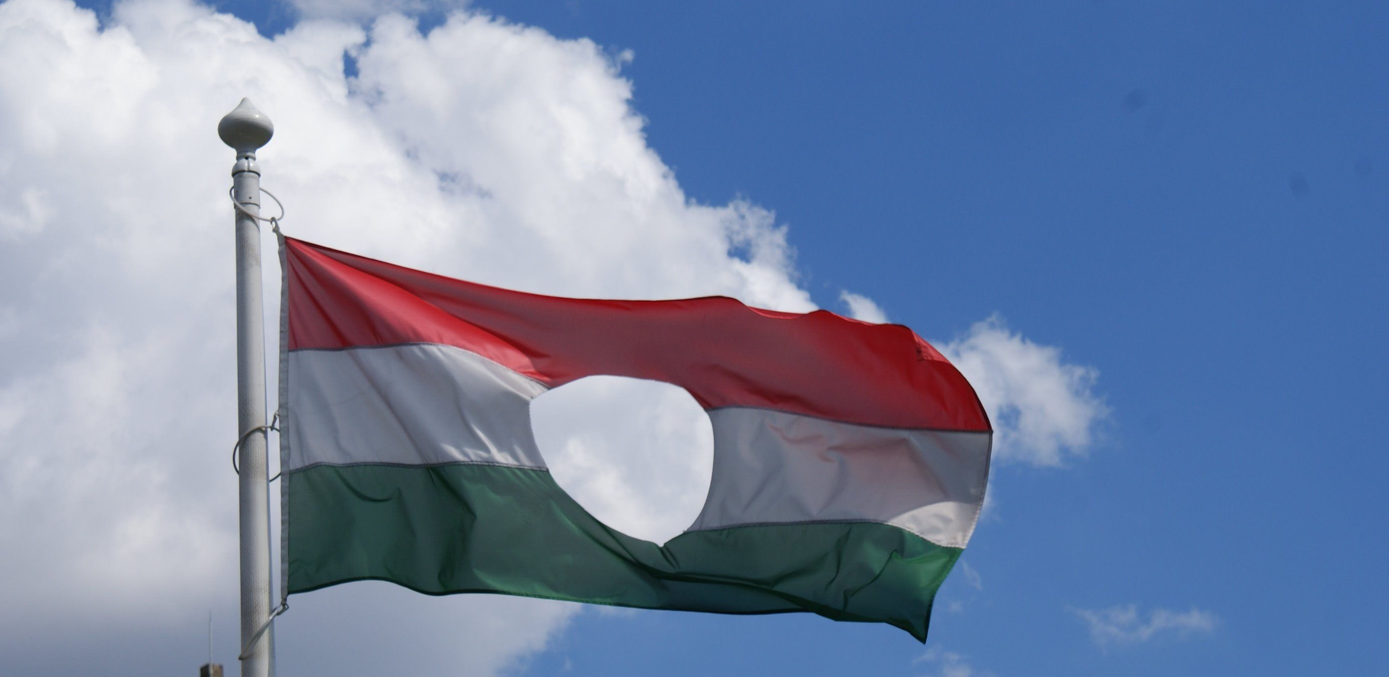 Flaga przed Parlamentem. Z wyciętym godłem Węgierskiej Republiki Ludowej.